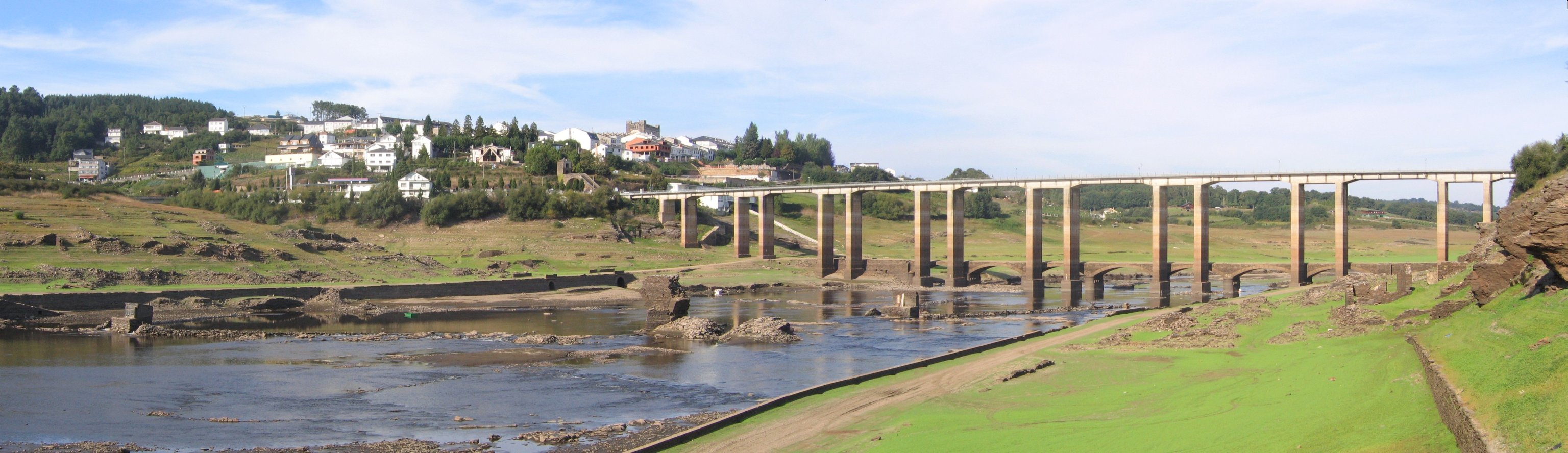 Portomarin (links) und seine Brücken: die moderne Brücke, die im Sept. 2005 aus dem Wasser ragende ältere Brücke und noch Reste einer alten Brücke. Die älteren Brücken sind nur wegen der Trockenheit im Sommer 2005 zu sehen, ansonsten vom Wasserspiegel des Stausees überspült. Selbst fotografiert, Sept. 2005